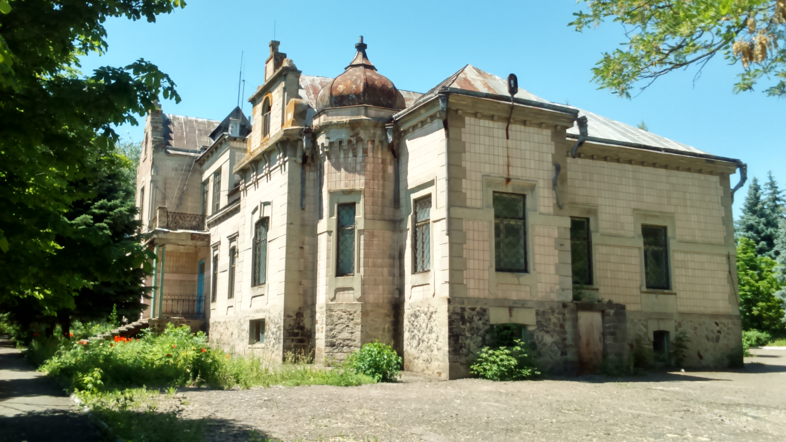 Маєток Роговського у Вірівці Добропільському районі Донецької області.